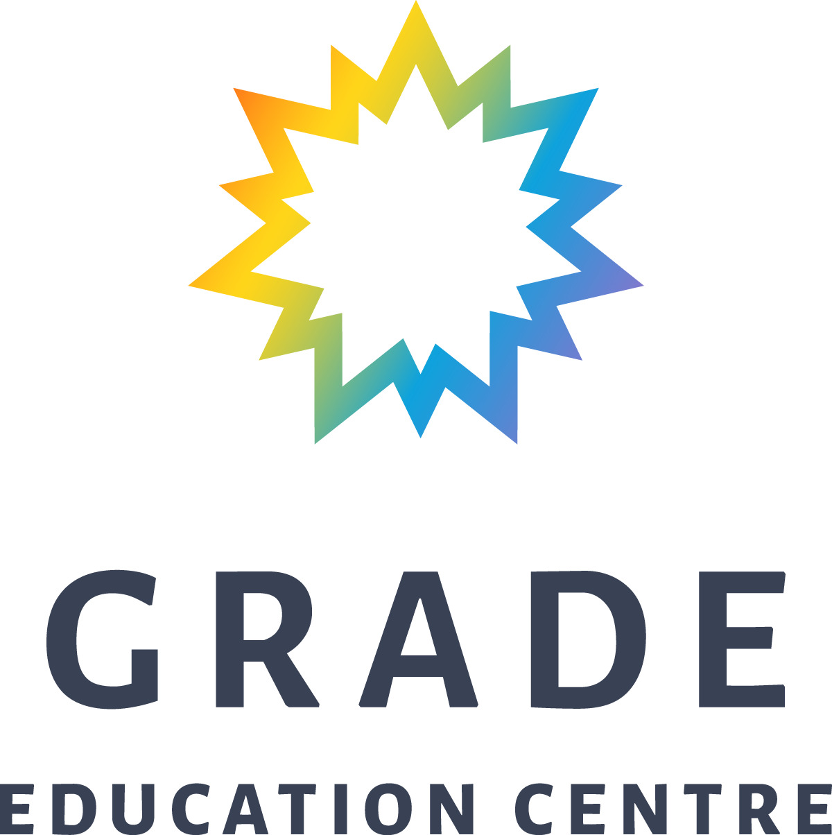 Логотип освітнього центру Grade